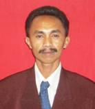 Romeu Moises, Abgeordneter des Nationalparlaments Osttimros